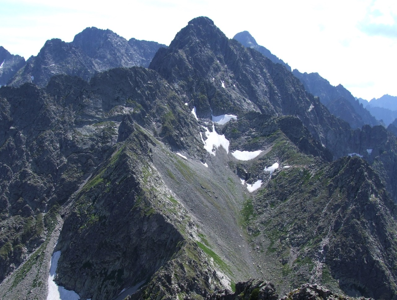 Widok w południowym kierunku z Jagnięcego Szczytu. Na środku Kołowy Szczyt, po jego lewej stronie Baranie Rogi, po prawej Lodowy Szczyt. Pod Kołowym Szczytem Bździochowa Kotlina